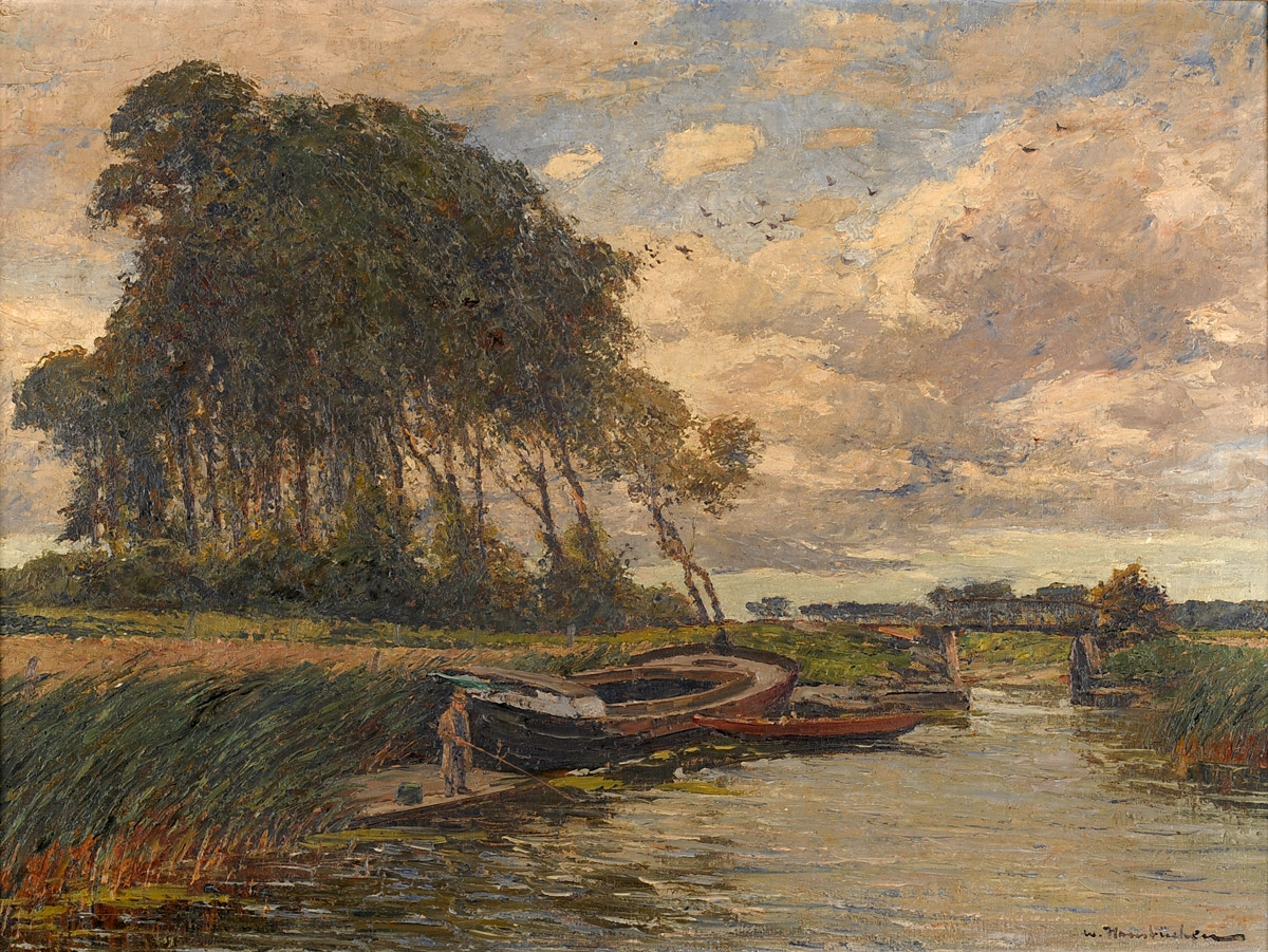 Angler am Niederrhein. Signiert. Öl auf Leinwand, 60 x 80 cm